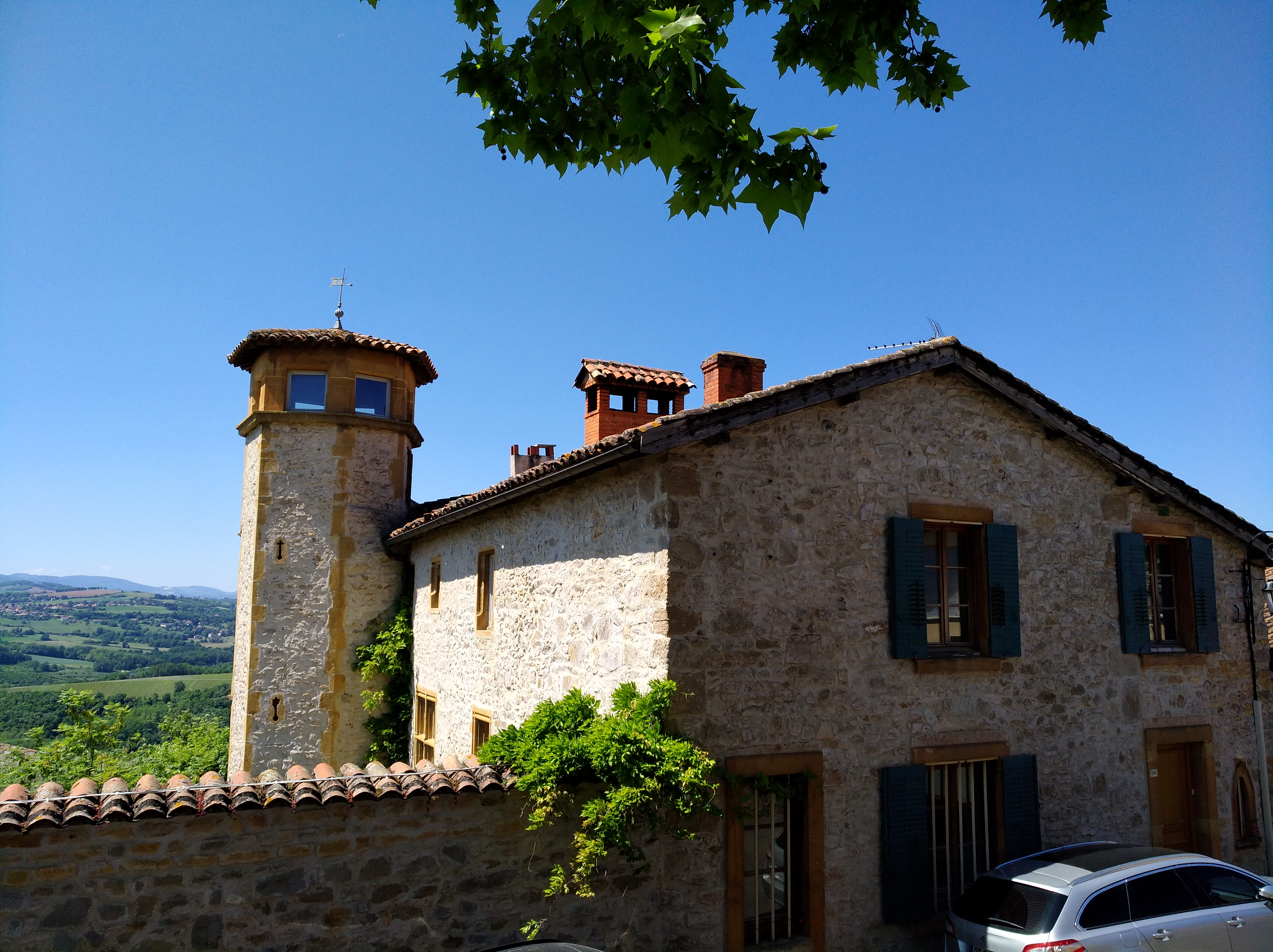 Ancien château de Belmont, à Belmont-d'Azergues, dans le département du Rhône, en France.